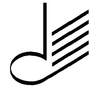 Das Bild zeigt das Logo der "Städtischen Musikschule Hamm".